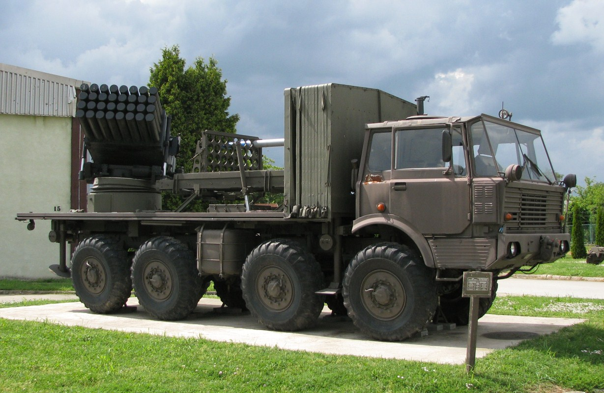 SVLR 122mm M96 Tajfun u Vukovaru